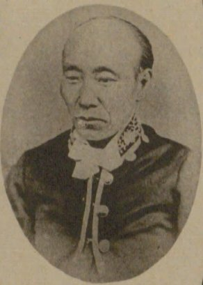 楫取素彦（1829-1912）